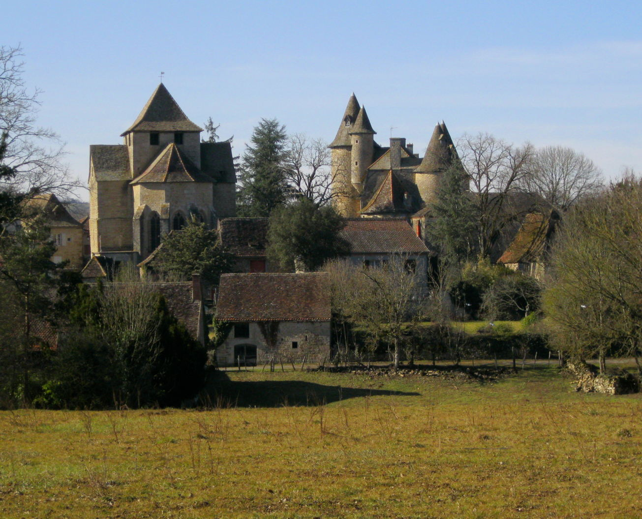 Vue du château et église de Thégra dans le département du Lot en France. Unknown